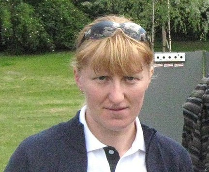 Magdalena Gwizdoń